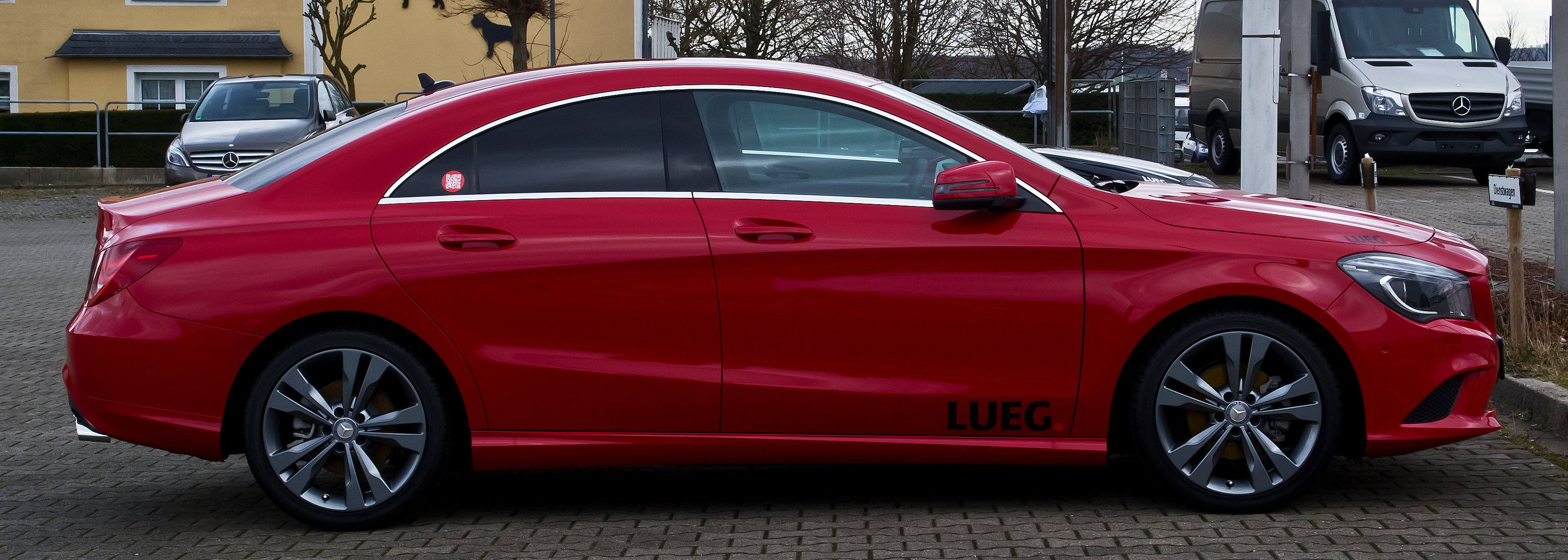 Mercedes-Benz CLA 180 Urban (C 117)